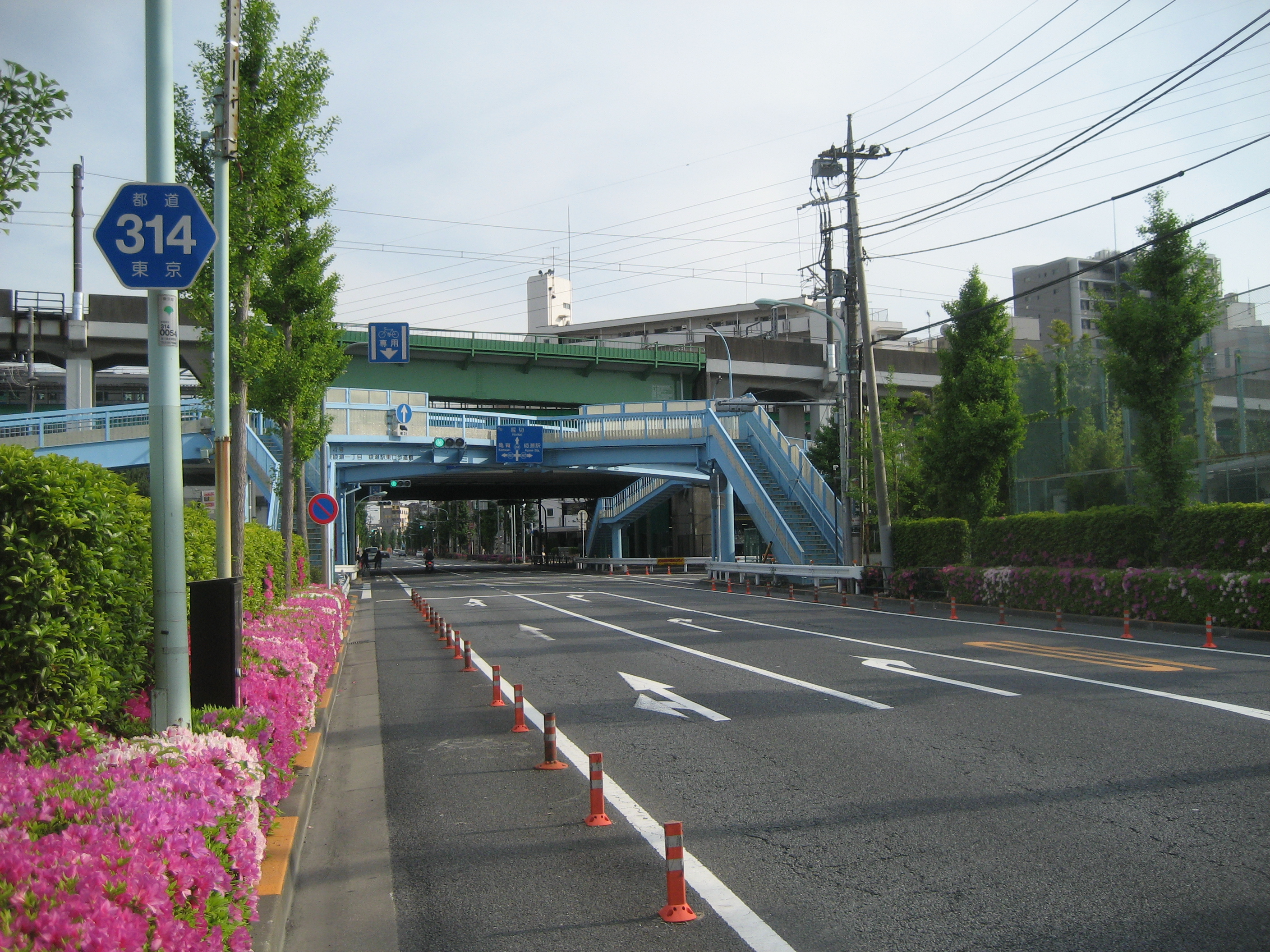 都道314号線足立区東綾瀬1丁目付近（堀切方面を撮影）